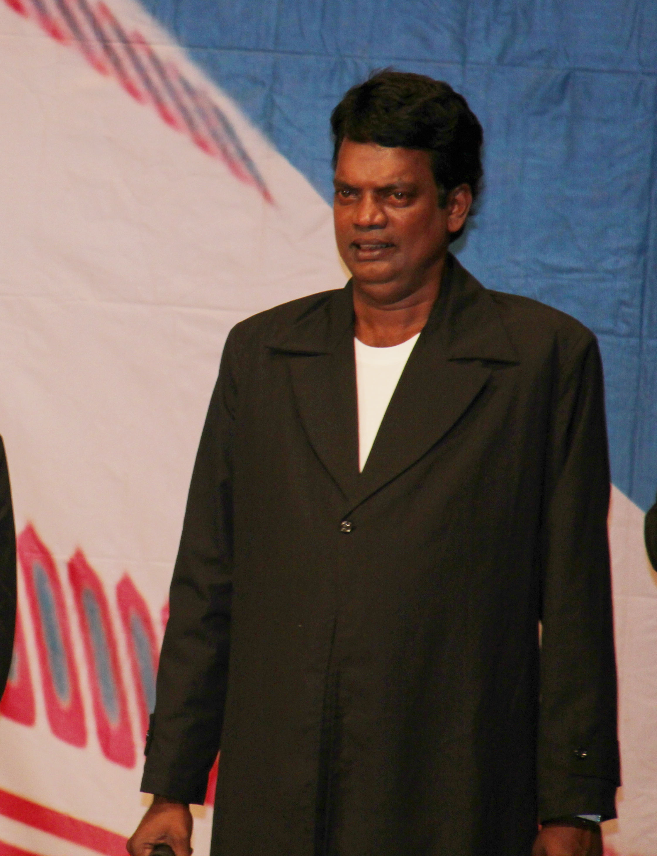 സലീം കുമാർ